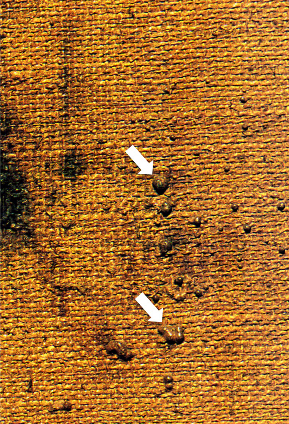 Die farbige Grundierung ist in mehr oder weniger großen Tropfen durch die handgewebte Leinwand gedrungen und läßt sich so gut untersuchen.